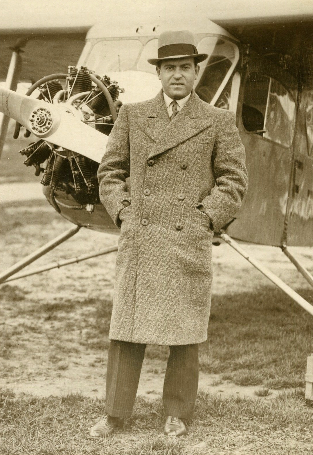 "PARIS-MADAGASCAR 1931: René LEFEBVRE" Photo originale G. DEVRED (Agce ROL)